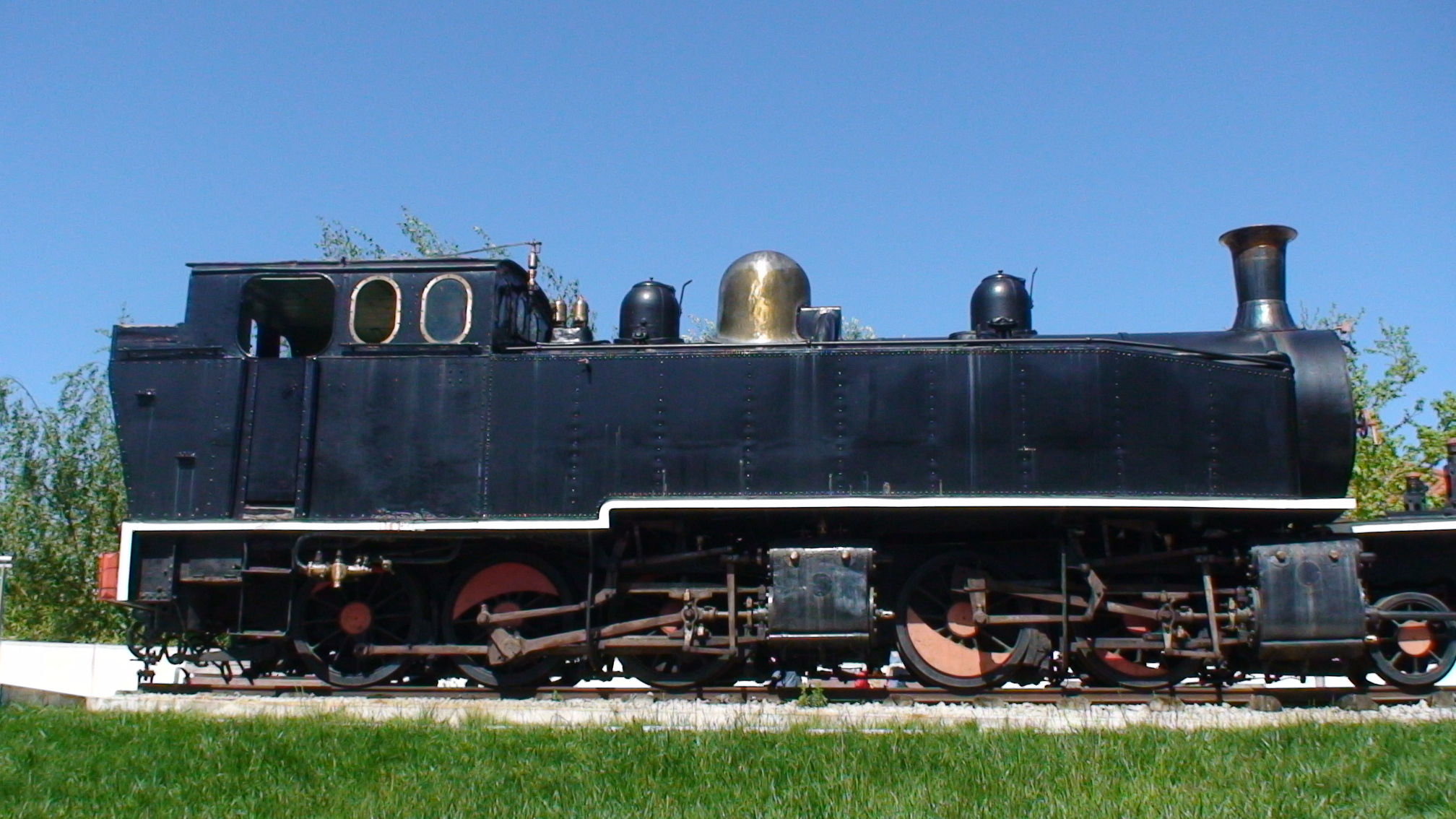 Locomotiva a vapor desactivada em Vouzela. Vista lateral.